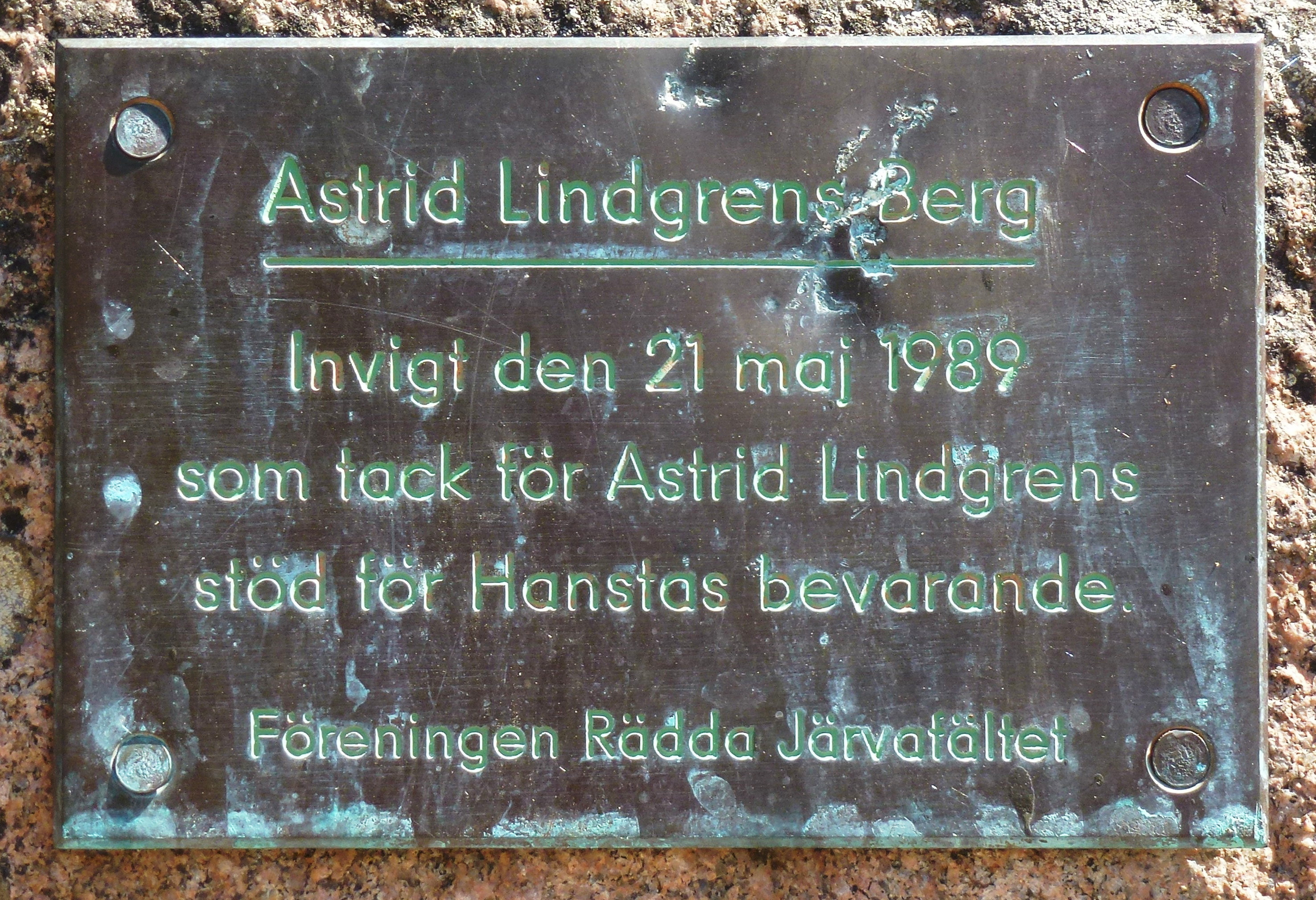 Hansta naturreservat med Astrid Lindgrens berg, skylt